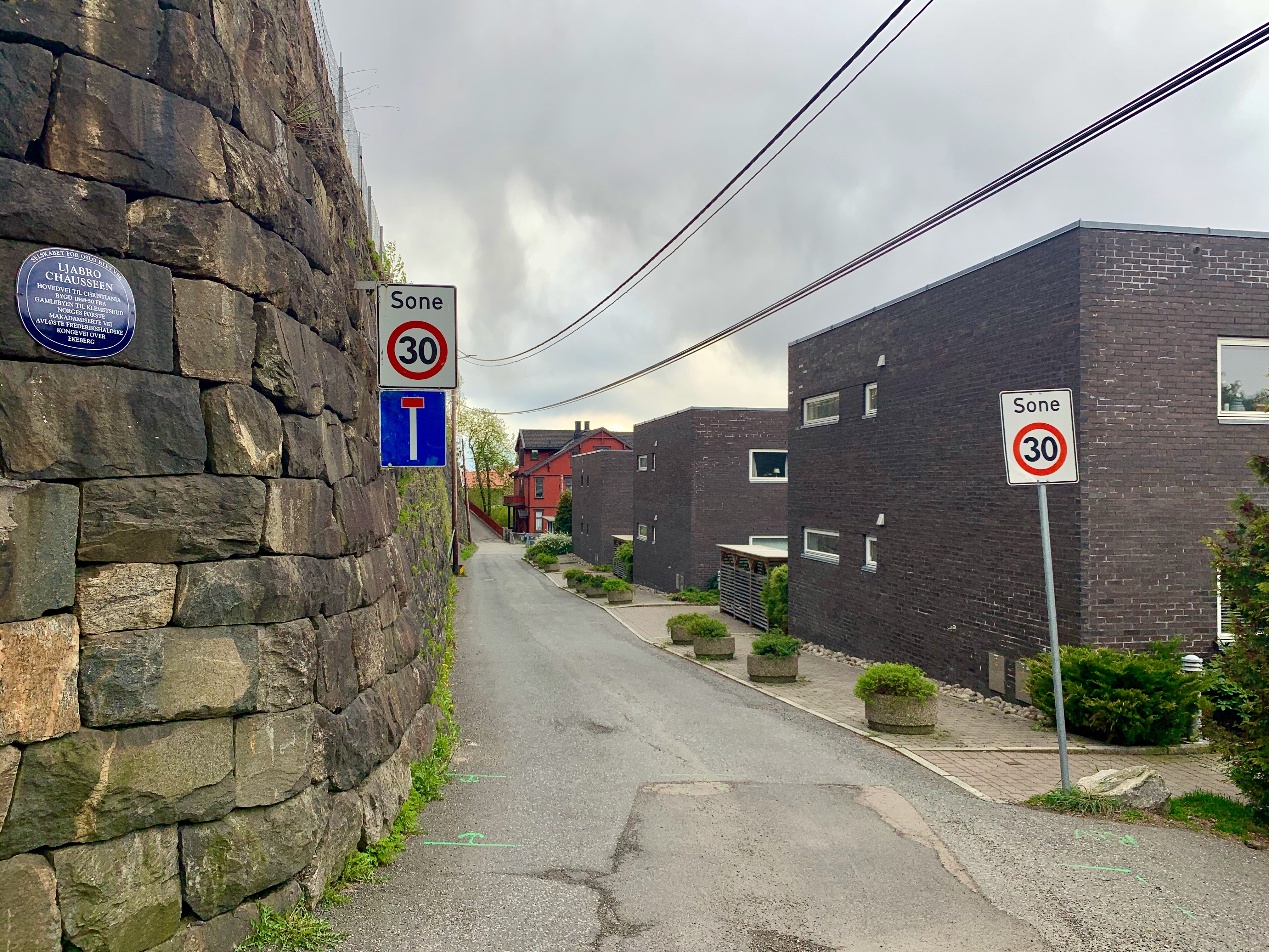 Vestlia på Ljan i bydel Nordstrand i Oslo.